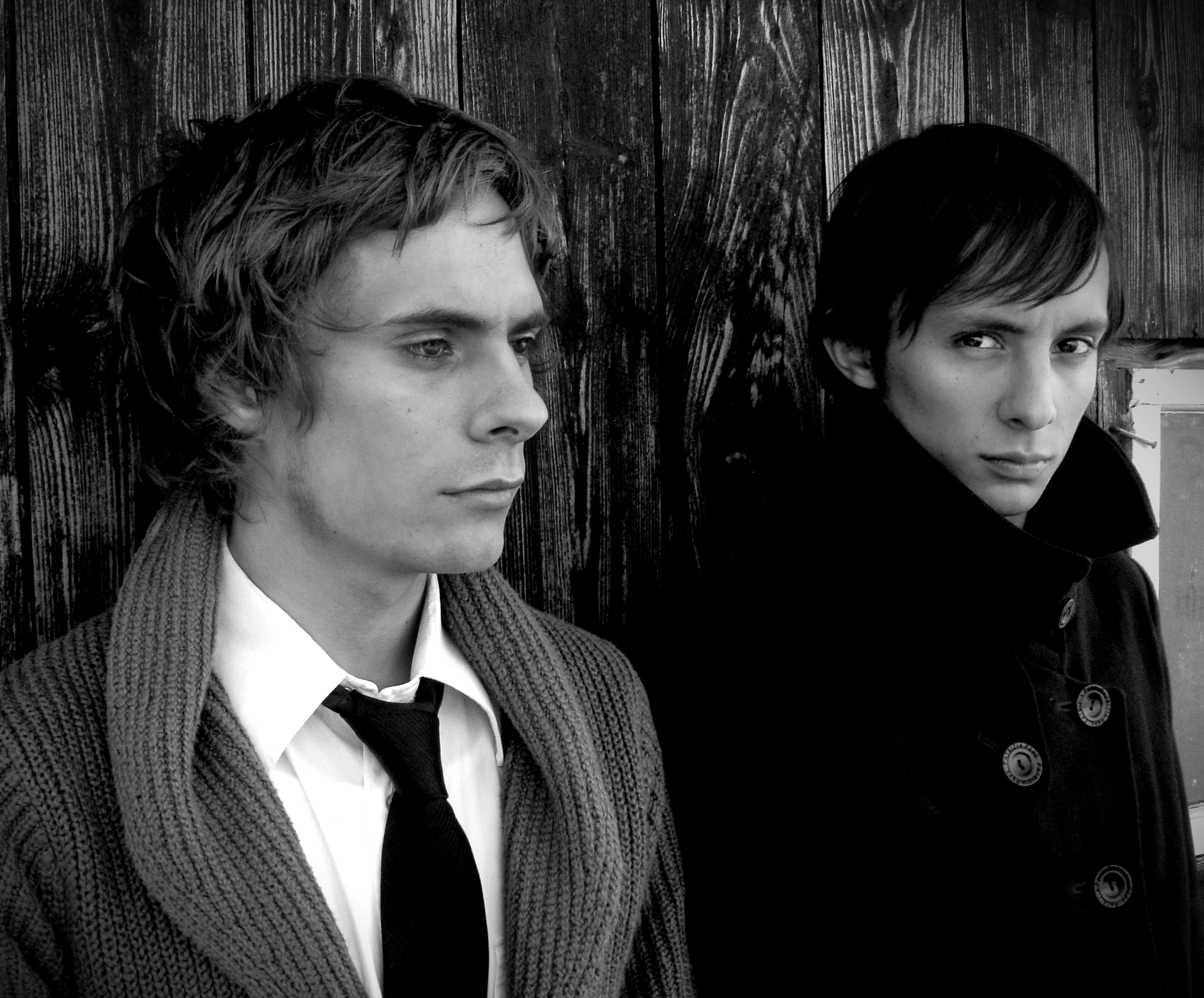 Snook gruppbild